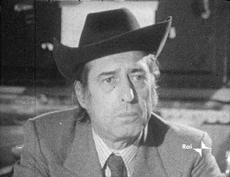 Schermata tratta da una videointervista del 1971